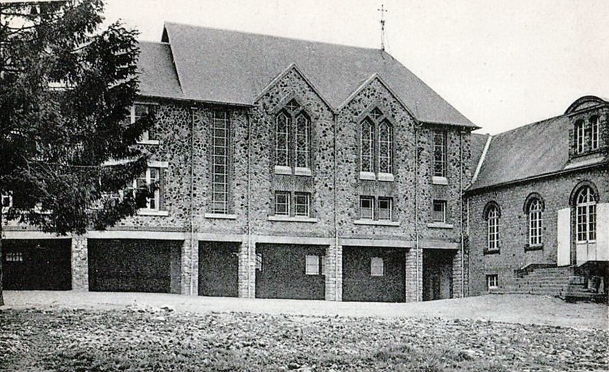 Chapelle de conception Paul Rouvière. On reconnaît la forme des baies vitrées commune à la chapelle Saint-Bruno d'Issy-les-Moulineaux de 1936.